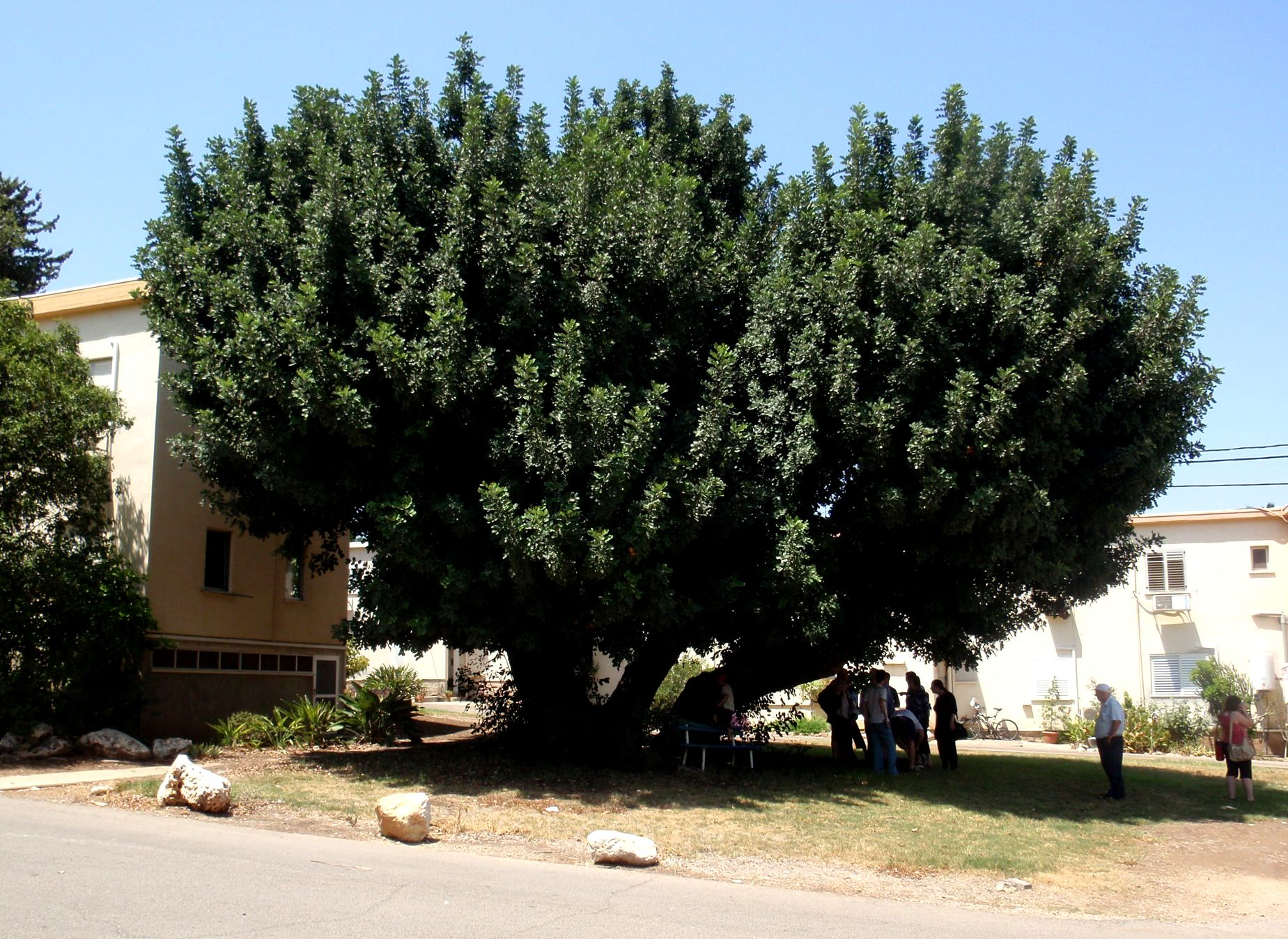 מפגש אלף מילים עץ החרוב העתיק בקיבוץ יגור